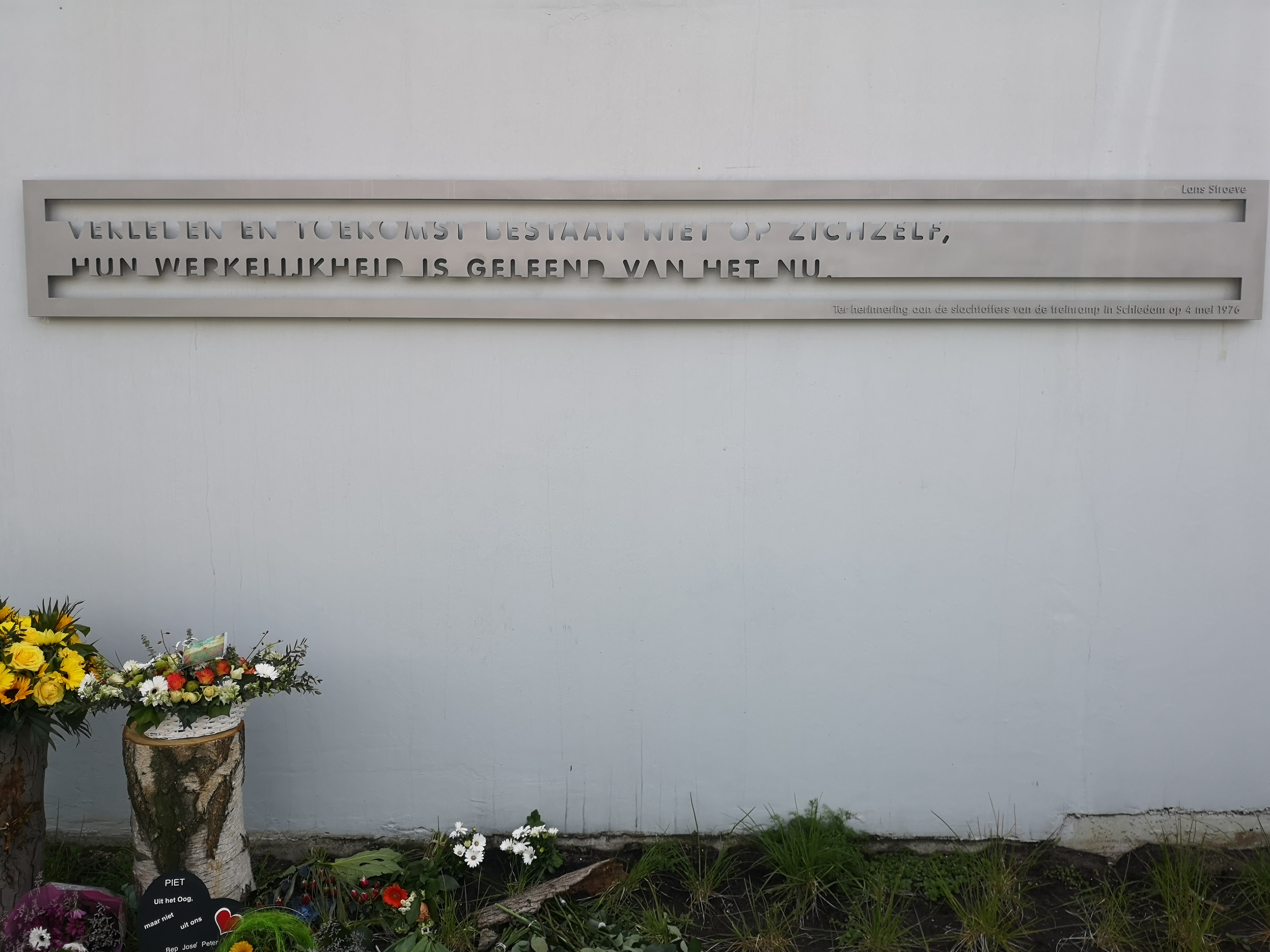 gedenkplaat treinramp Schiedam. bij station Schiedam Nieuwland. foto genomen op 6 mei 2019